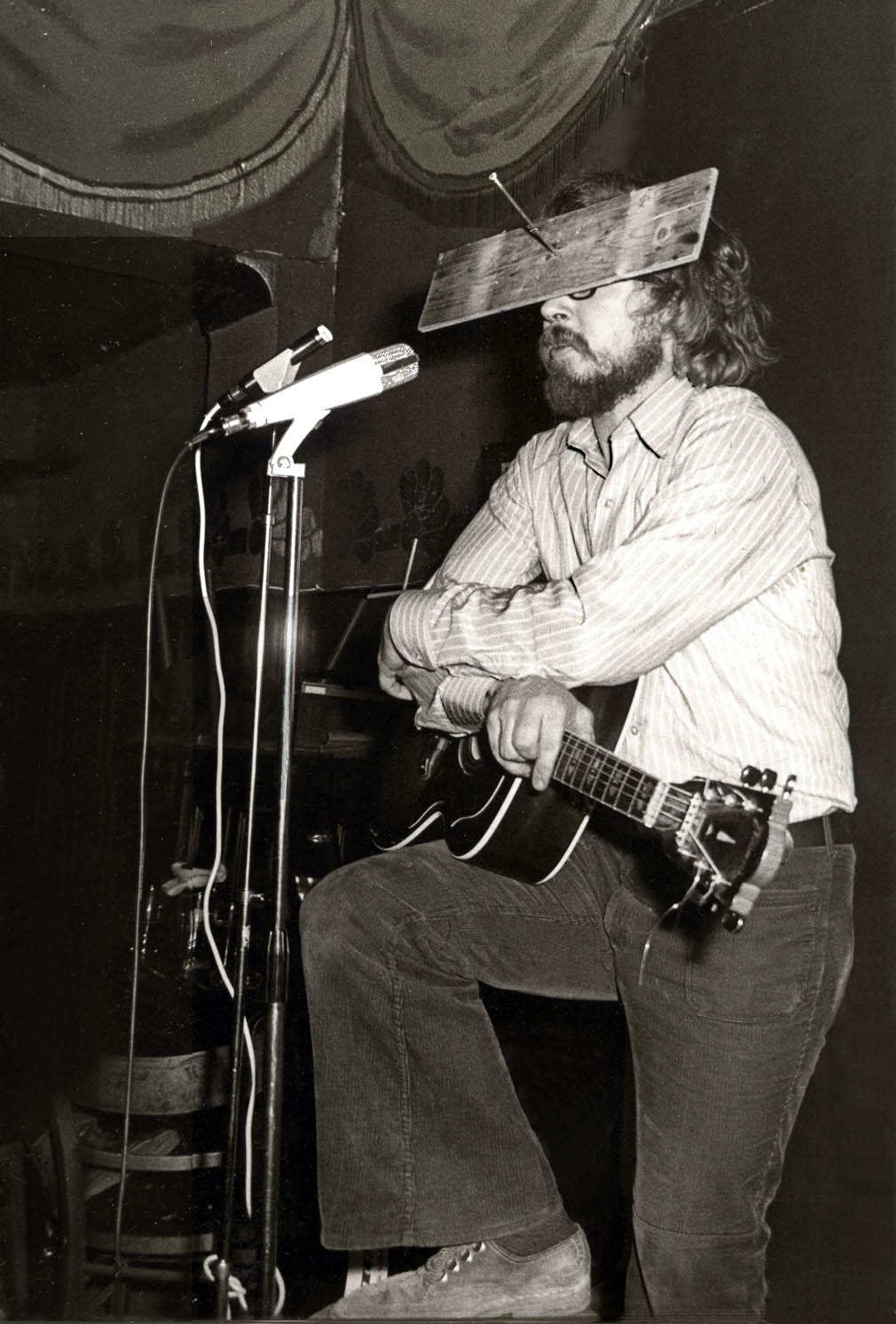 Helmut Wagner 1971 im Kabarett KEKK in München-Schwabing